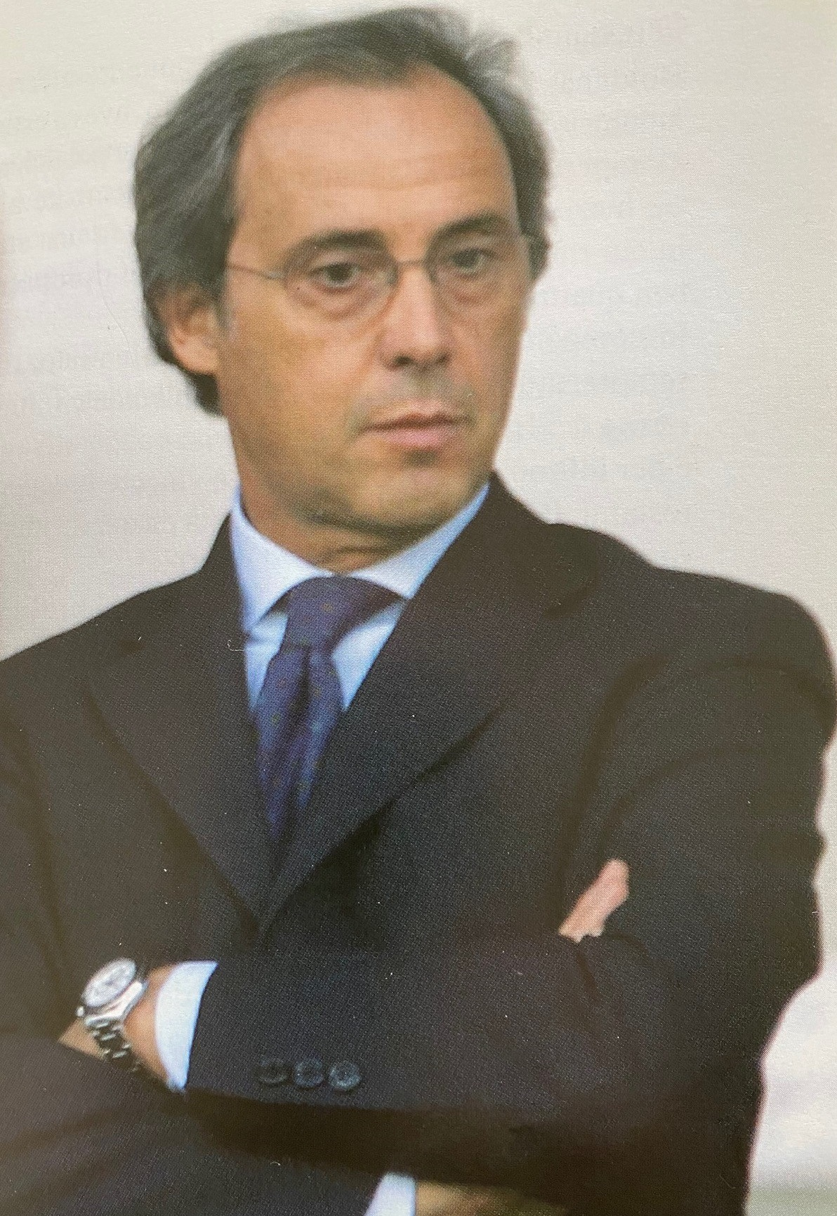 Arbitro